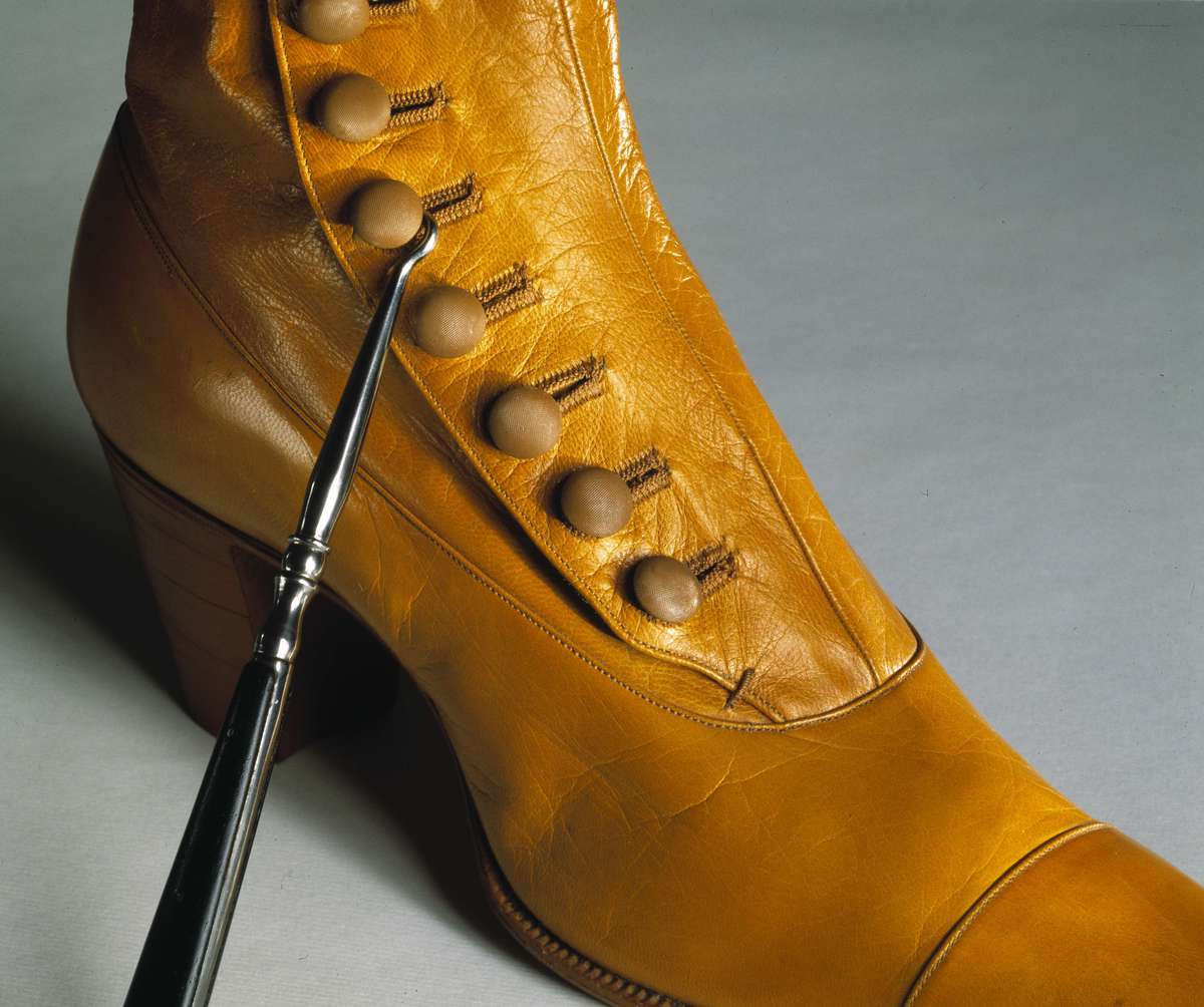 Damkänga från 1899 med kängknäppare. Kängan är beställd i Paris och använd av fru Emily Fick, född Kylander, Stockholm. Nordiska museet inv.nr 198826